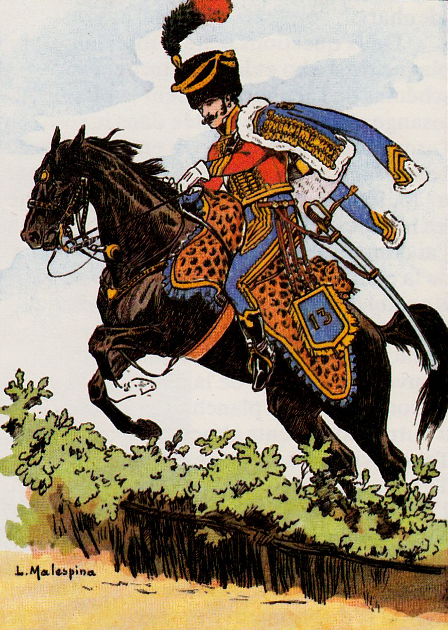 Officier des hussards Jérôme-Napoléon en grande tenue, 1814. Cdt E.-L. Bucquoy : « L'officier en grande tenue de la planche 156 est d'après Martinet. L. Malespina a omis de lui mettre sa ceinture qui fait partie de sa tenue. »